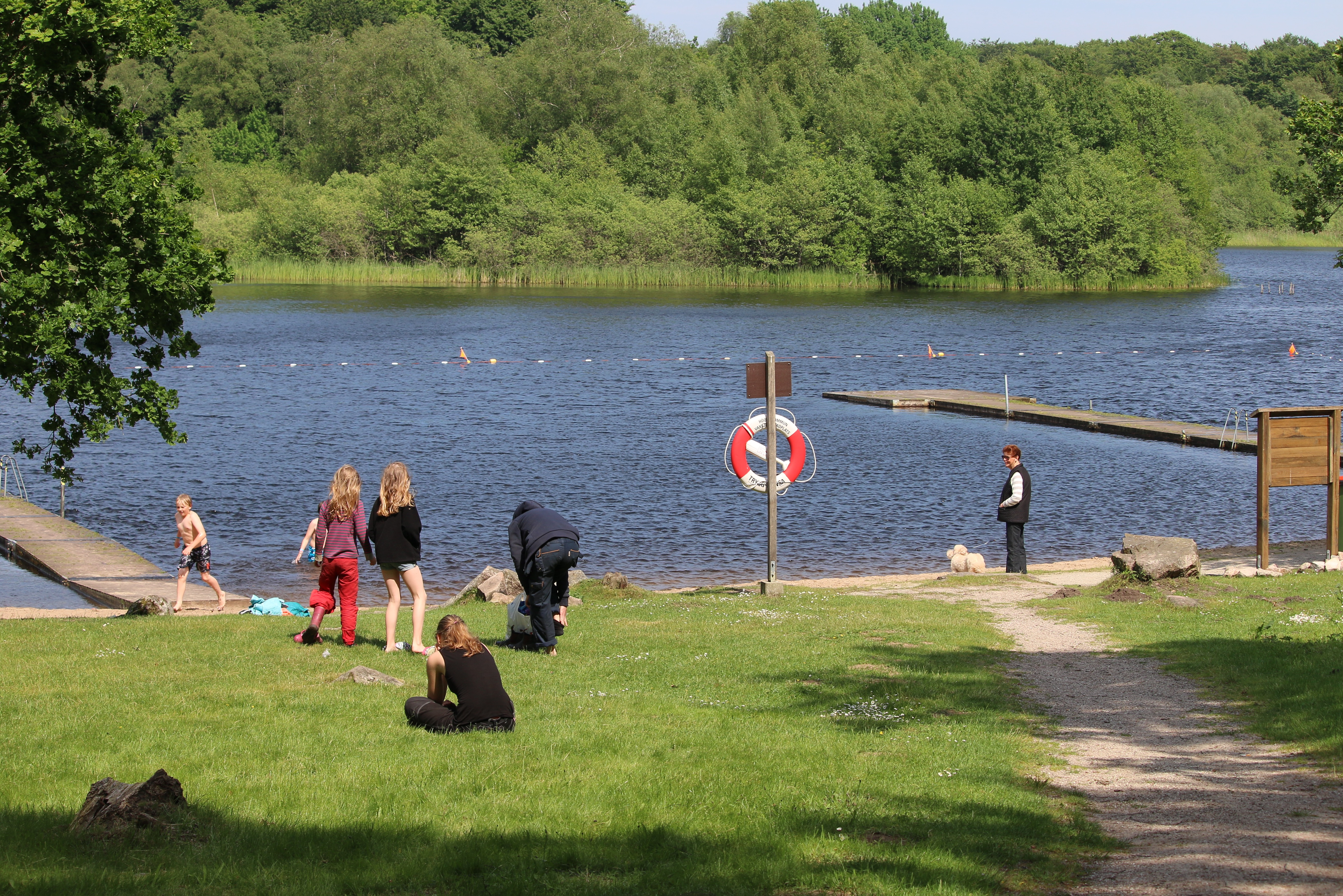 Vaxsjön, Skåne